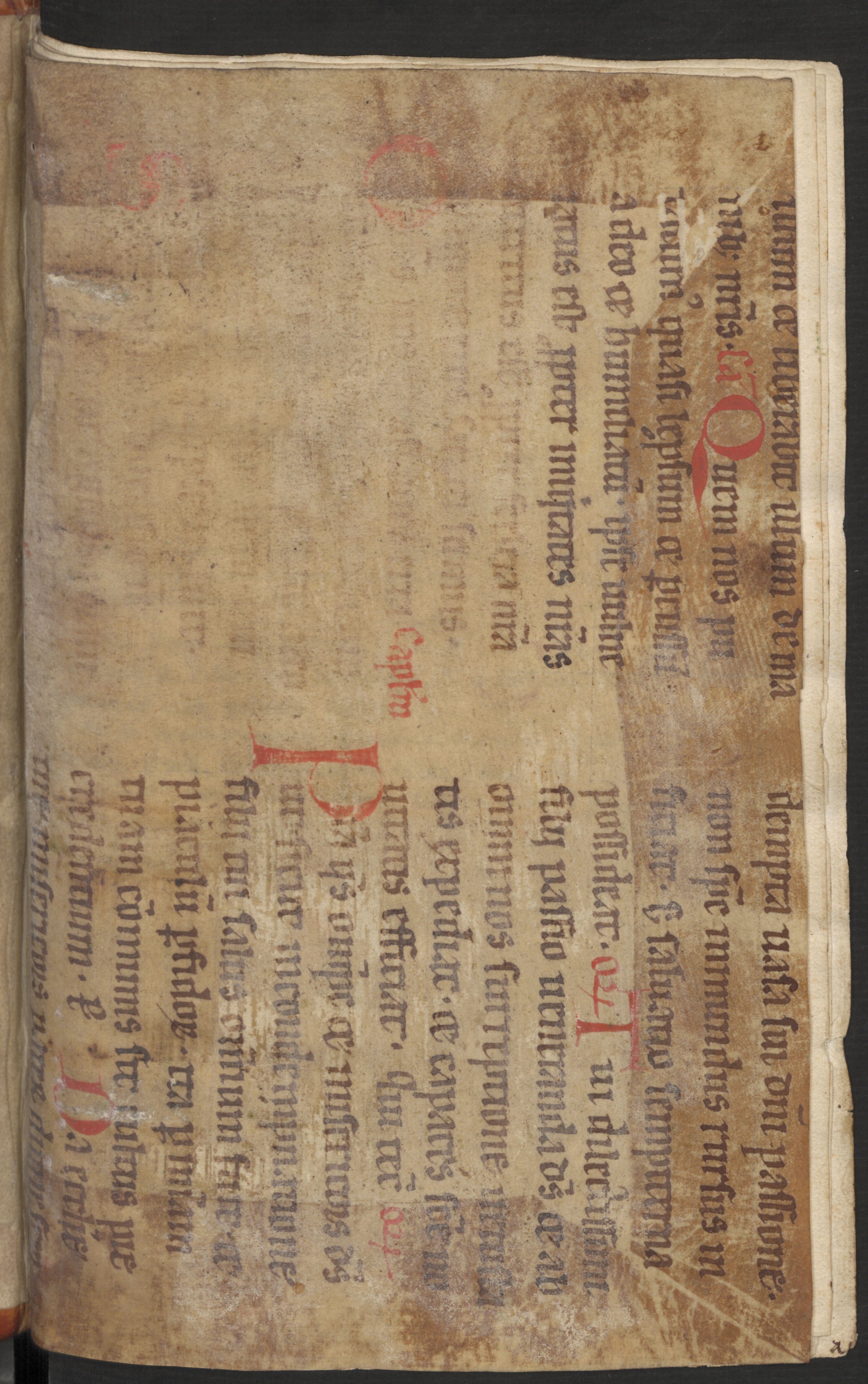 Hs.382, schutblad